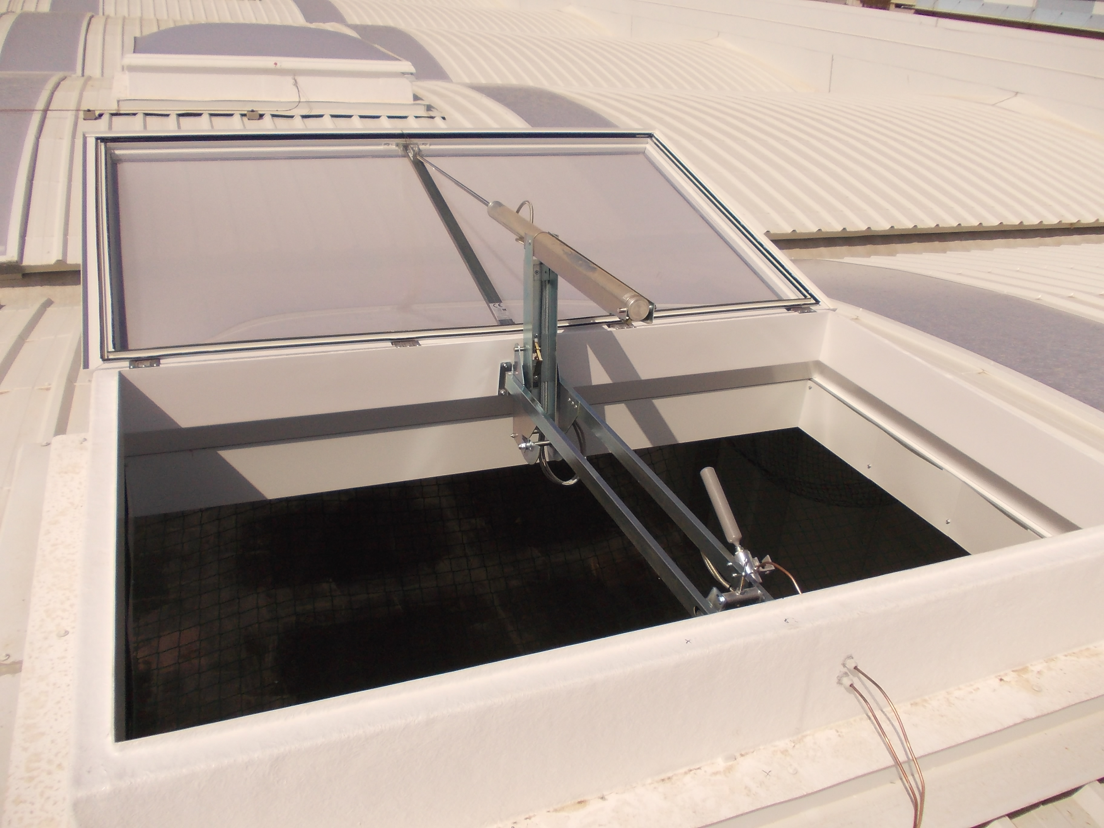 Exutorio claraboya abierto